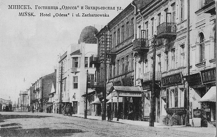 Беларуская (тарашкевіца): Менск (Miensk), вуліца Захараўская (vulica Zacharaŭskaja) каля скрыжаваньня з Фэліцыянаўскай (vulica Felicyjanaŭskaja). Будынак Таварыства ўзаемнага крэдыту